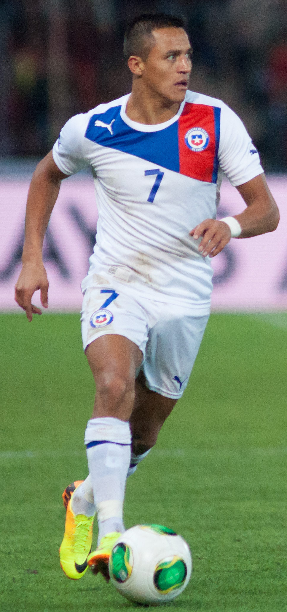 Espagne - Chili, 10 septembre 2013.